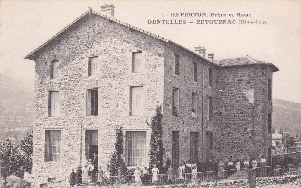 Manufacture de dentelles Experton à Retournac